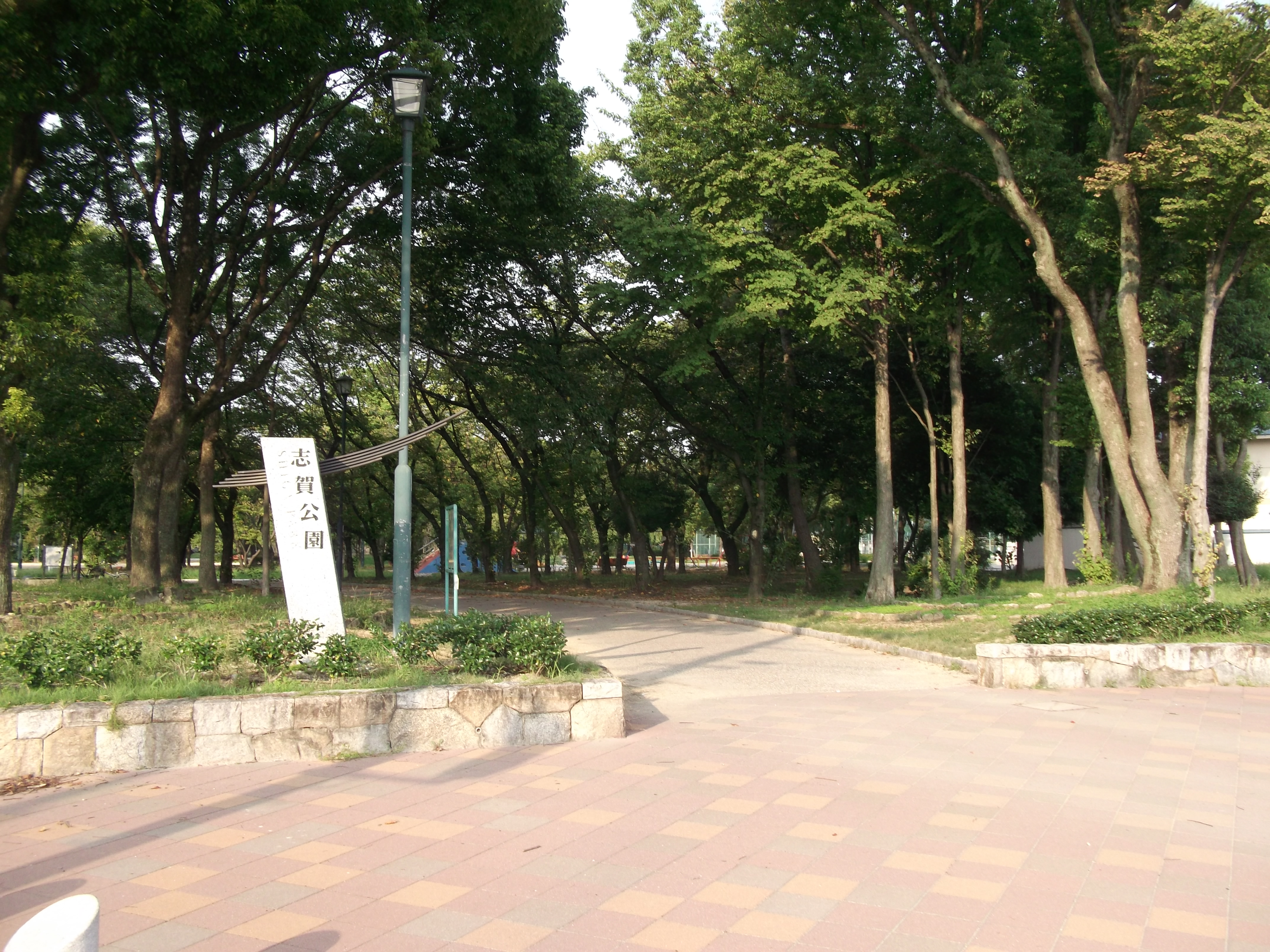 名古屋市北区の志賀公園